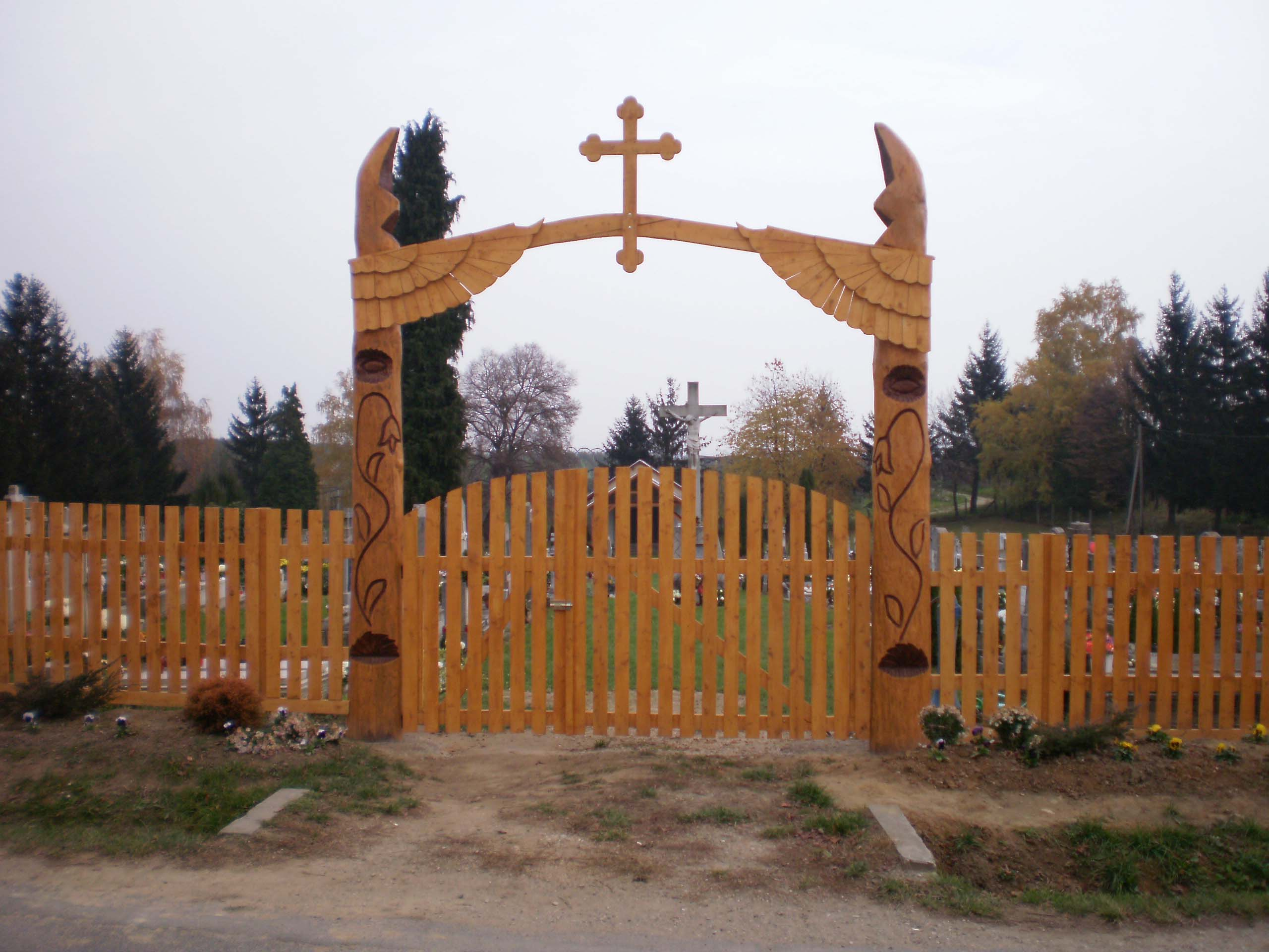 petömihalyfa temetõ